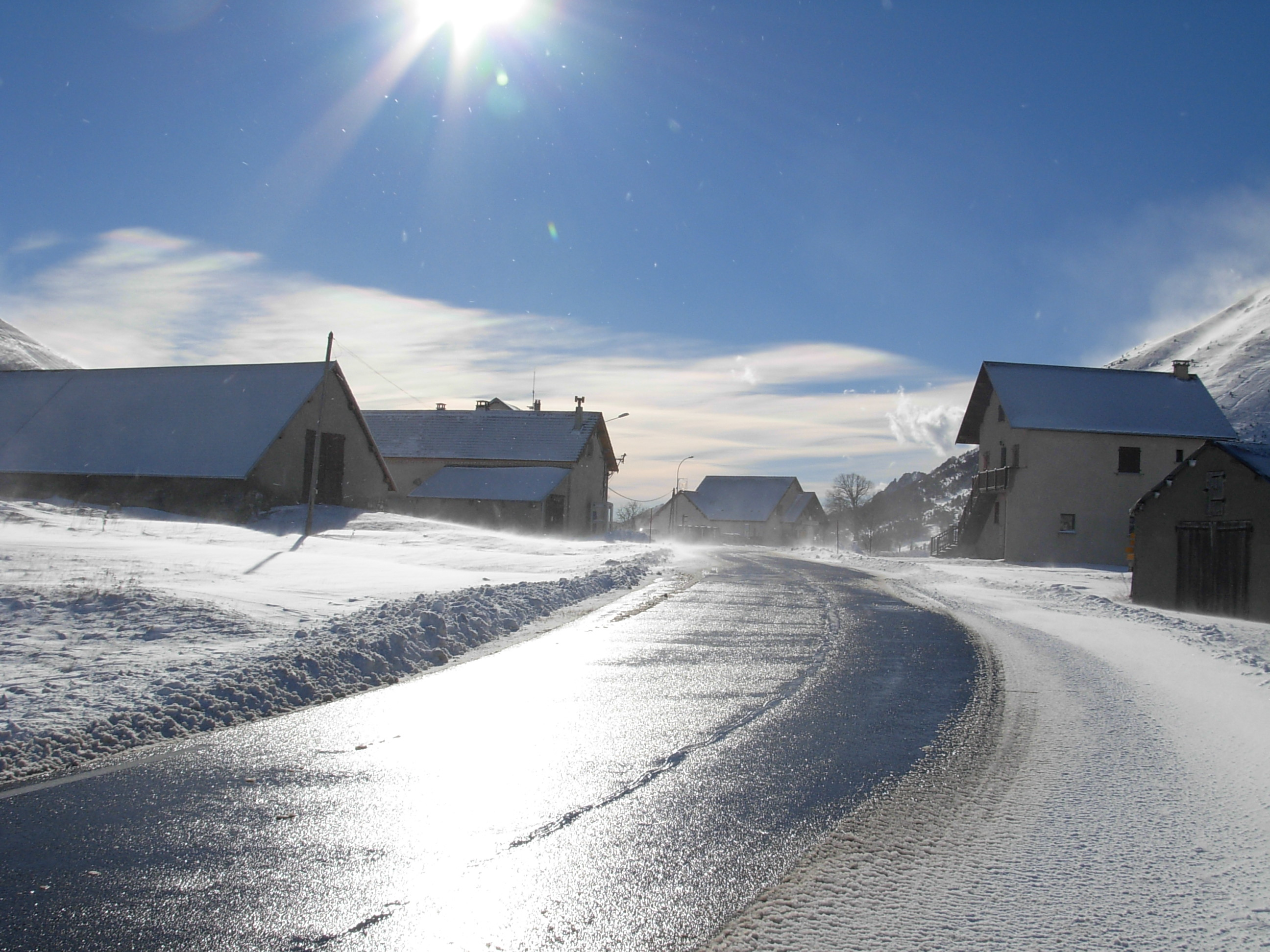 Le col du Festre